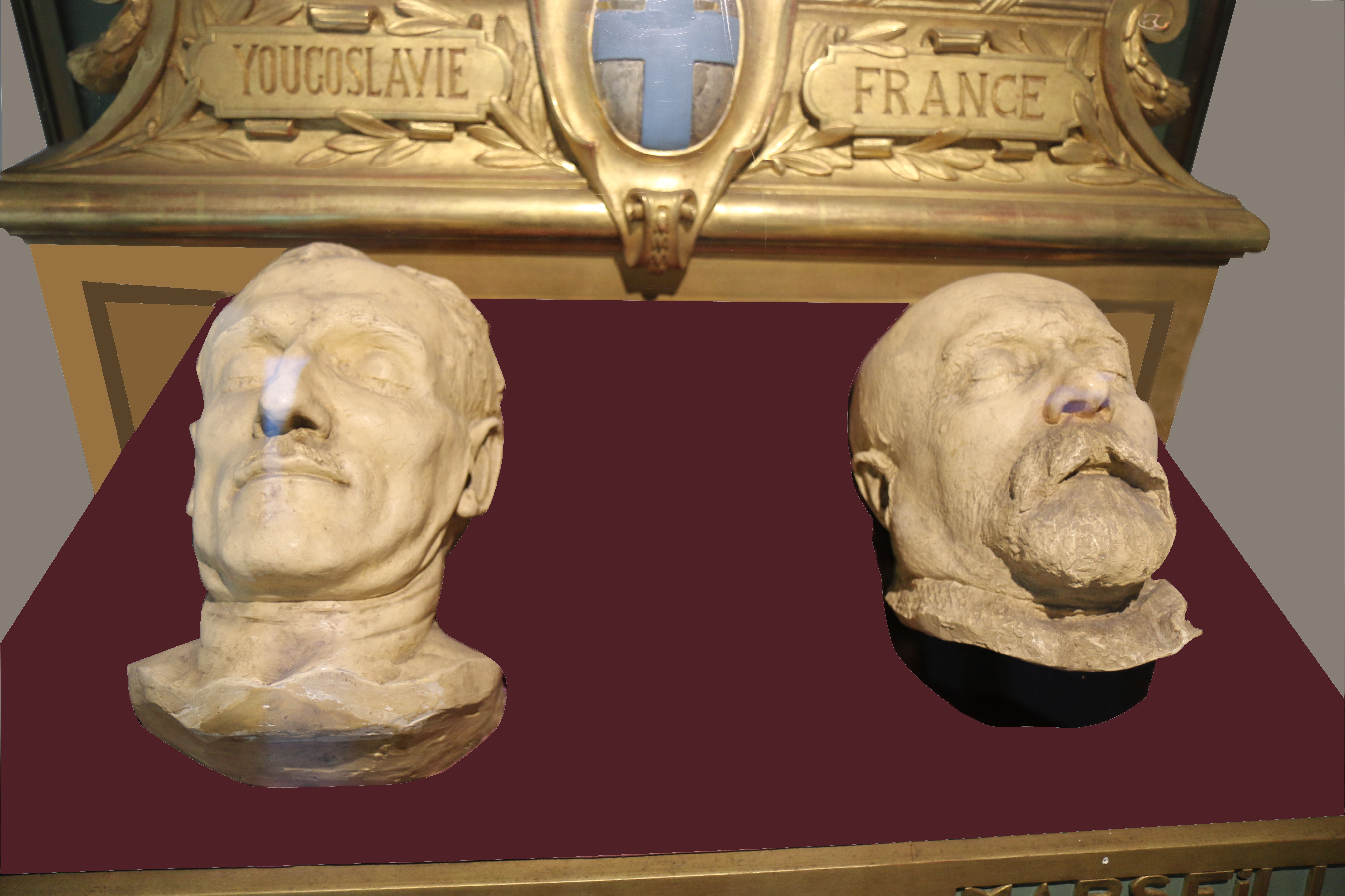 Masques mortuaires do roi Alexandre I de Yougoslavie et de Louis Barthou assassinés à Marseille conservés au Musée d'histoire de Marseille.